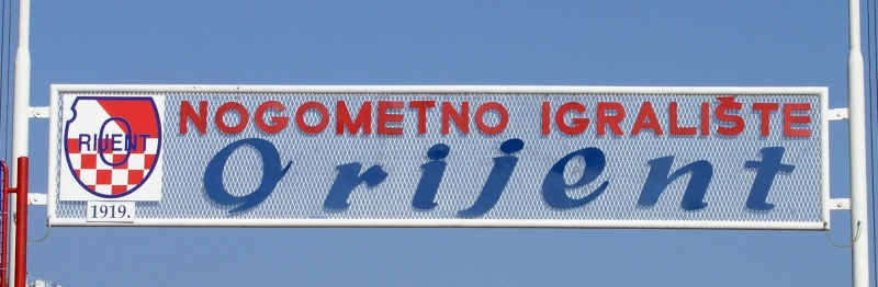 Ulaz na nogometno igralište NK Orijent u Rijeci, Hrvatska